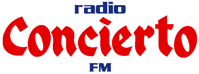 Logotipo de Radio Concierto de 1980 a 1995